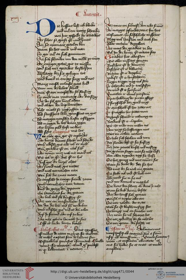 Hugo von Trimberg "Der Renner"